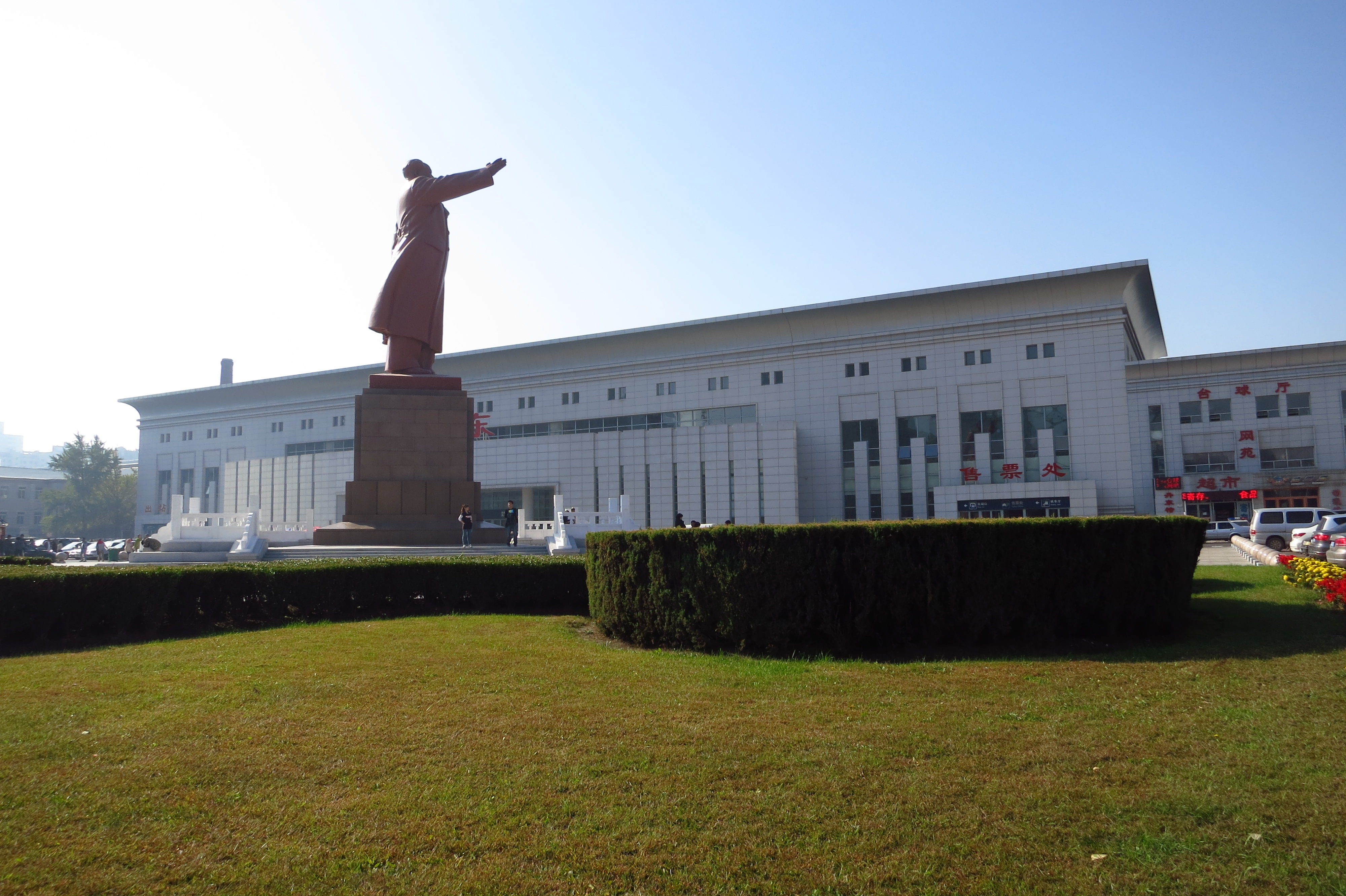 巡道工出品 photo by xundaogong 毛主席手指北京方向